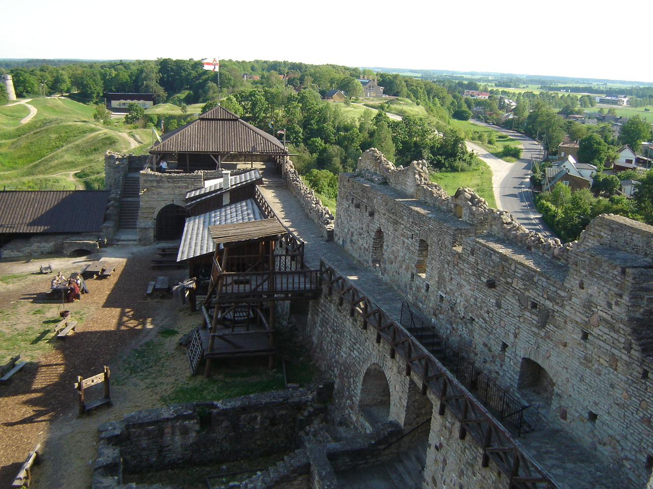 Linnuse sisehoov ja läänemüür